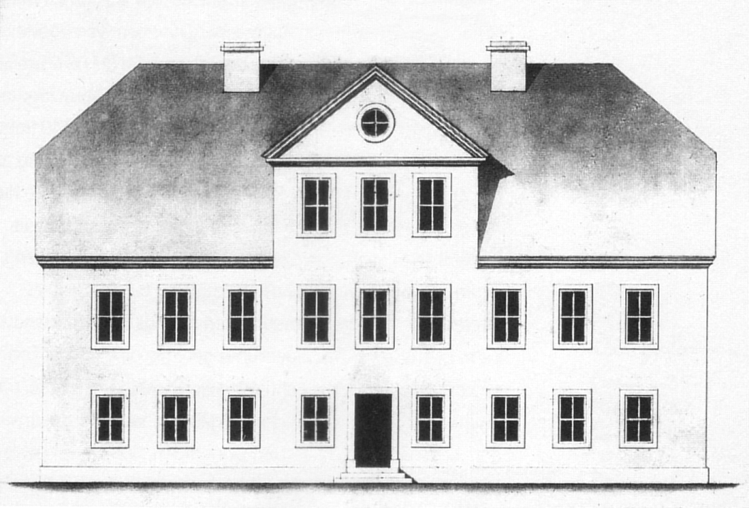 Amt Vorsfelde